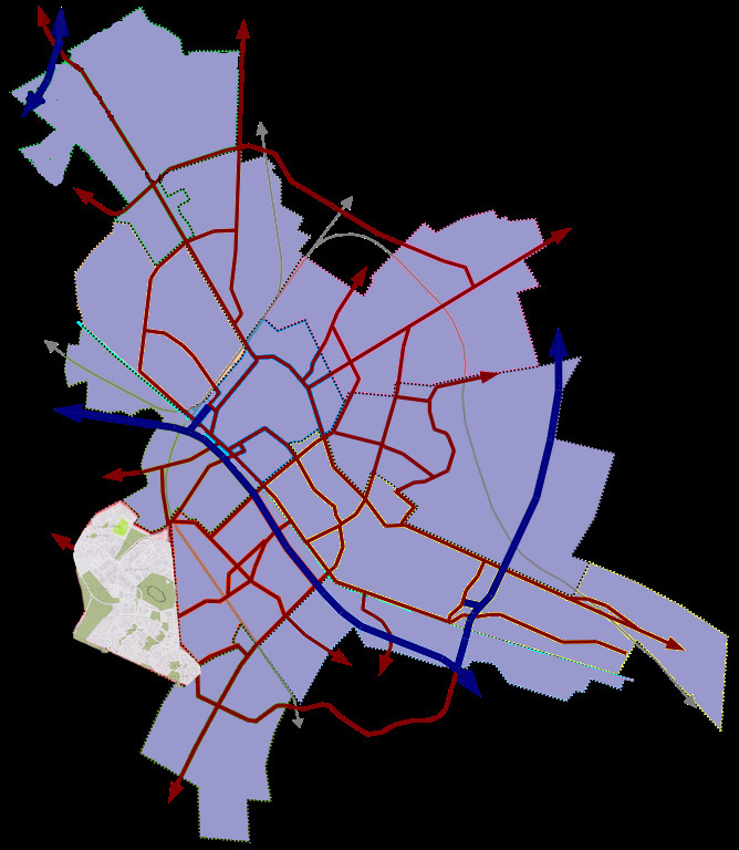 Carte du quartier Croix Rouge sur fon de carte de Reims.